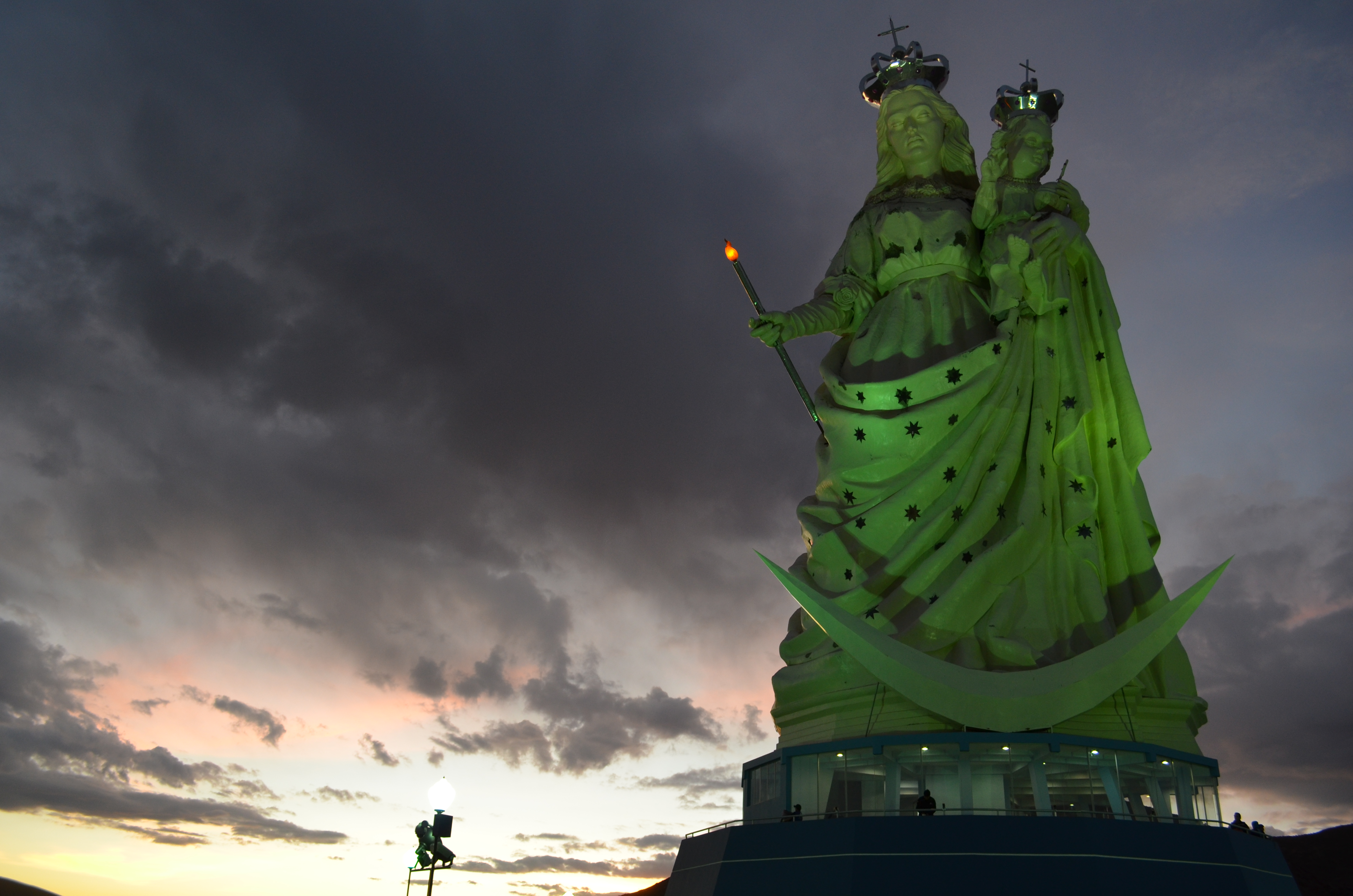 Este monumento se encuentra ubicado en la ciudad de Oruro Bolivia.